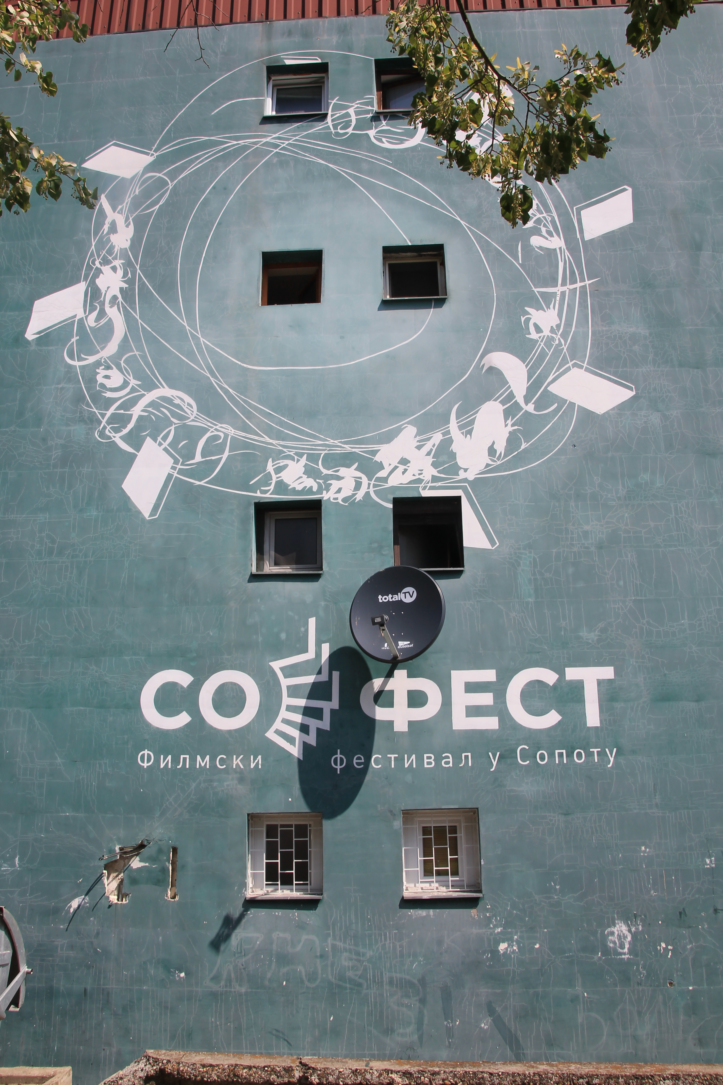 SopSopot, Belgradeot, Belgrade